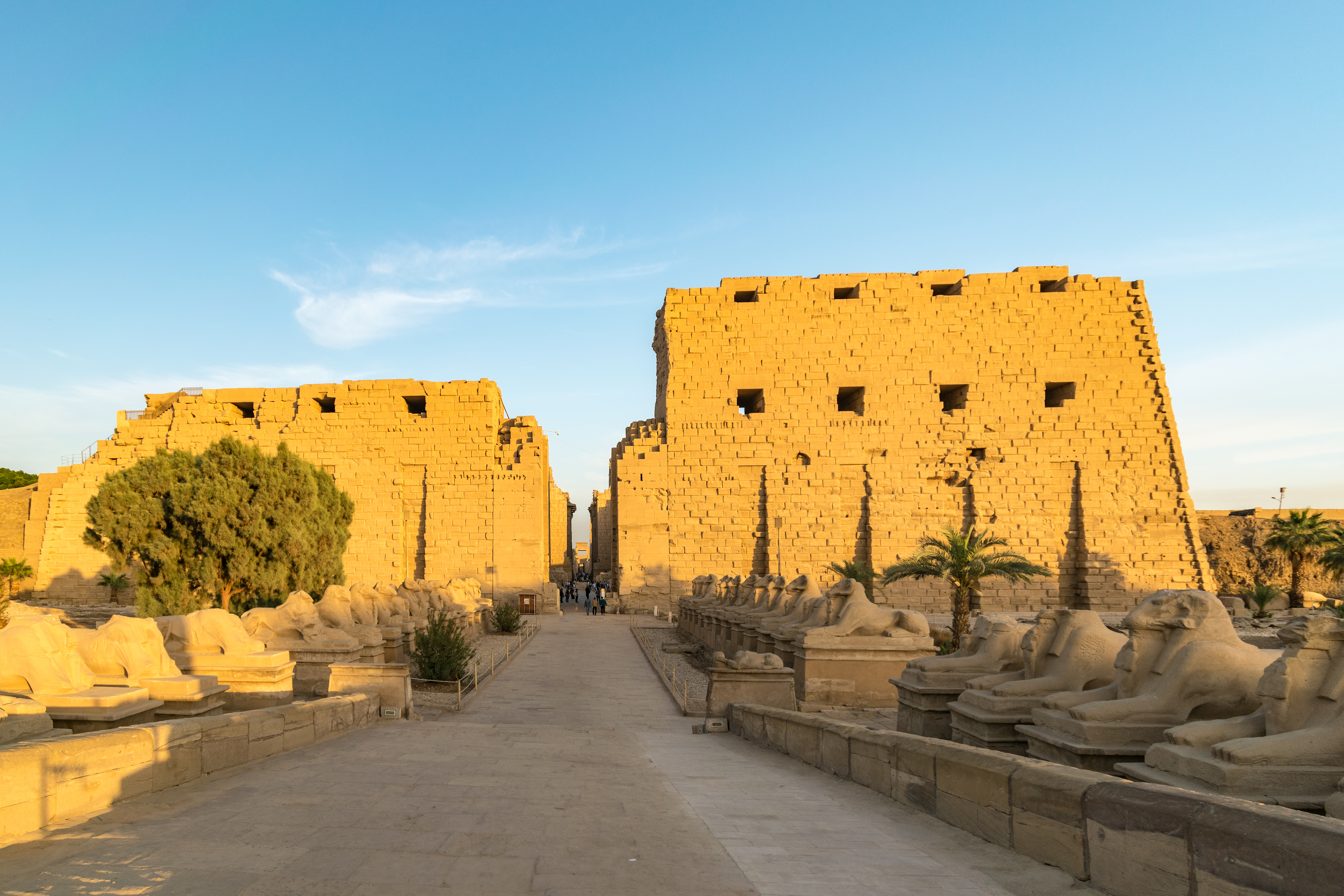 Westlicher Eingang zur Karnak Tempelanlage